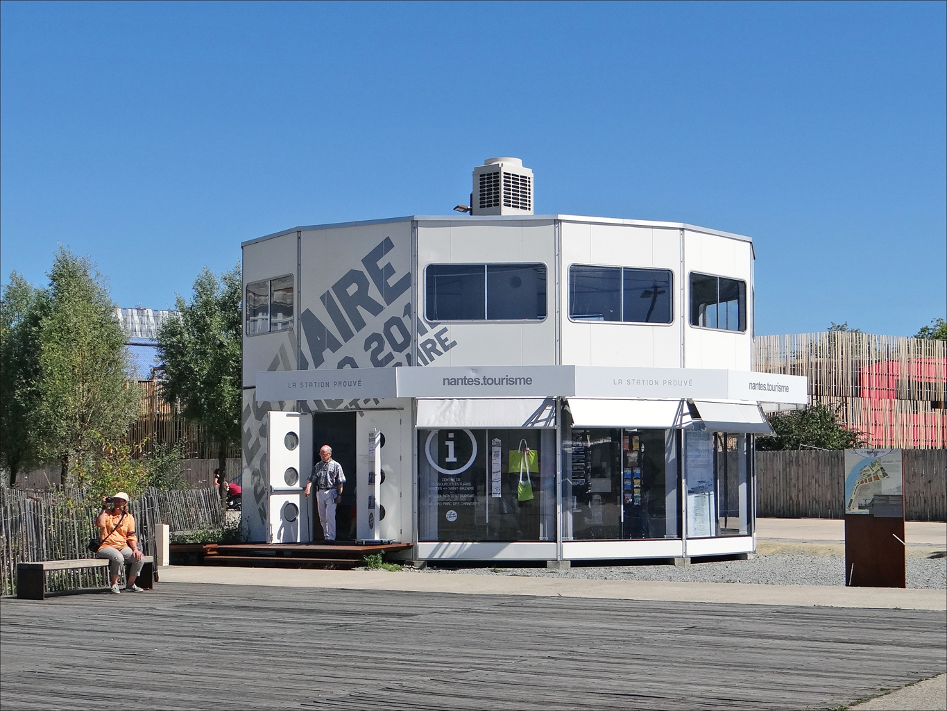 La station Prouvé est le bureau d'accueil de Nantes Tourisme sur le Parc des chantiers Ce bâtiment métallique polygonal a été créé à la fin des années 1960 par Jean Prouvé à la demande de la société Total pour servir de station-service déplaçable. Le prototype a été réhabilité à l'occasion d'Estuaire 2009. "Le Voyage à Nantes" (15 juin-19 août 2012) est une opération promotionnelle du territoire par l'art contemporain dirigée par Jean Blaise et qui succède à la biennale Estuaire dont 2012 est la dernière édition. Site du Voyage à Nantes Autre bâtiment de Jean Prouvé (photo dalbera)